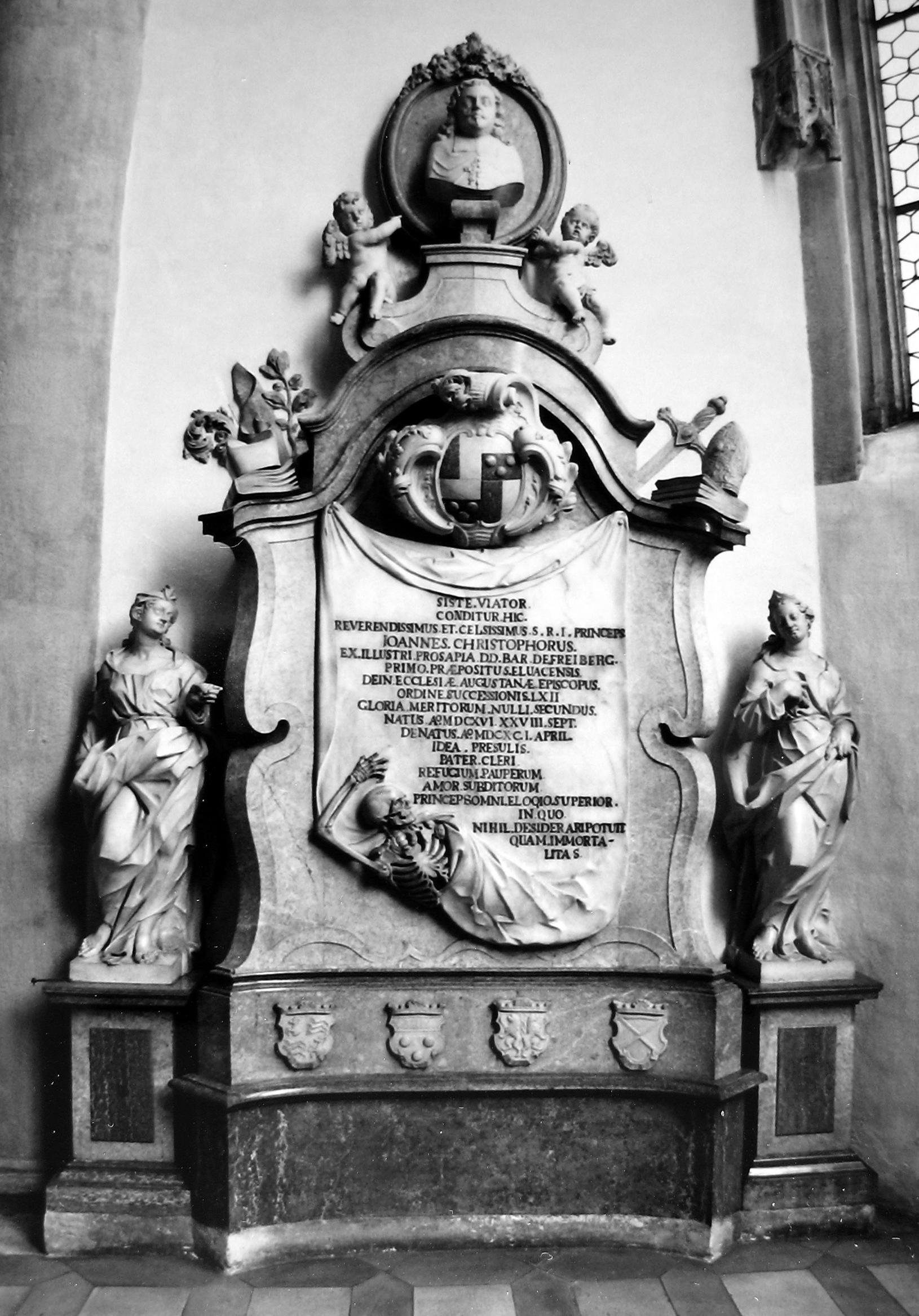 Johann Georg Fischer, Epitaph für Bischof Johann Christoph von Freyberg im Augsburger Dom; Wappen: Bischofswappen Johann Georgs (geviert: Augsburg / Freyberg-Eisenberg), darunter als Ahnenwappen die Wappen seiner vier Großeltern: Humpis von Waltrams, Freyberg-Eisenberg, Rechberg, Essendorf